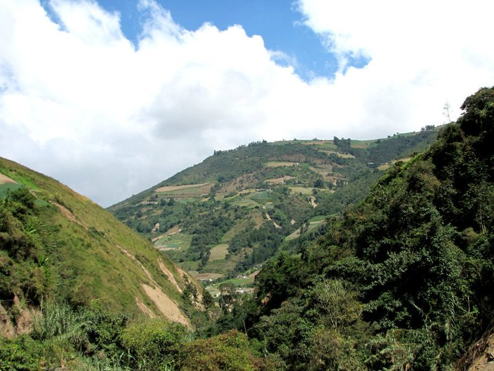 Páramo El Zumbador, estado Táchira - Venezuela (2006)